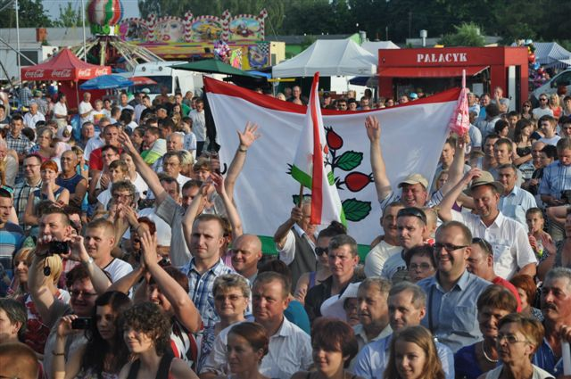 widownia pikniku